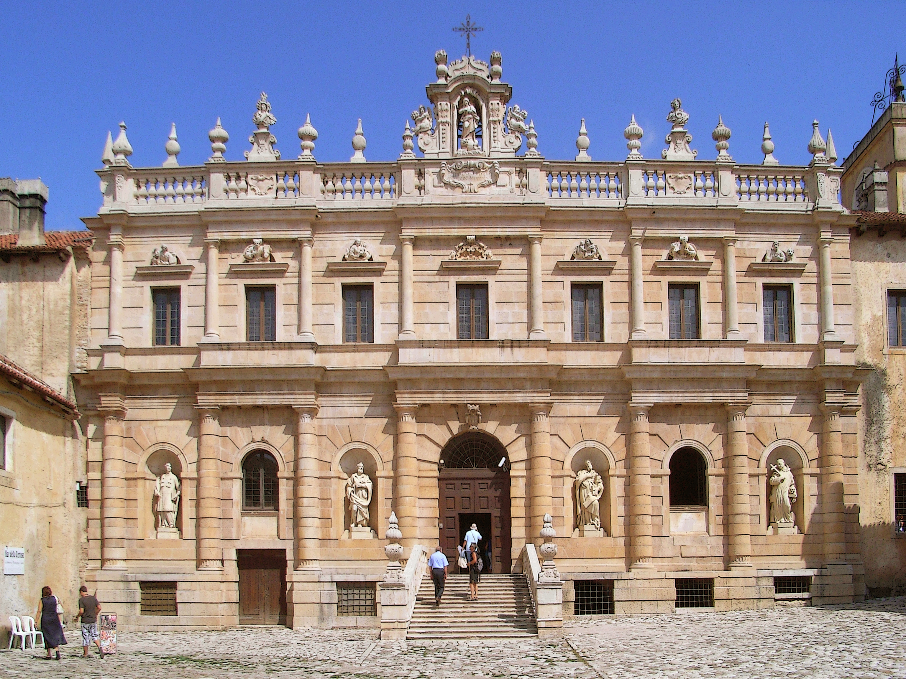 Facciata della certosa di Padula.